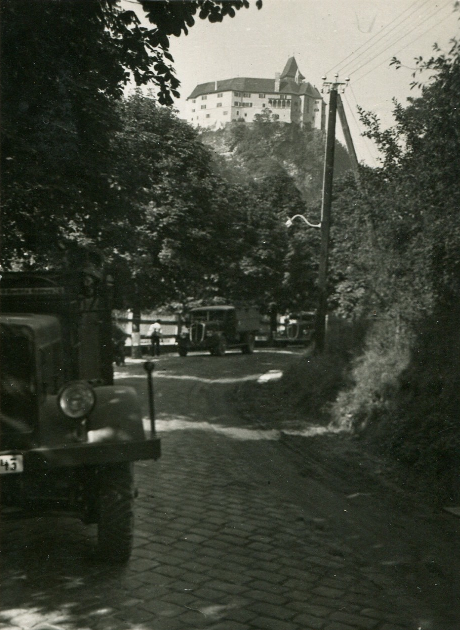 Lastwagen der deutschen Wehrmacht auf der Fahrt durch Rosenburg, Gemeinde Rosenburg-Mold, Niederösterreich